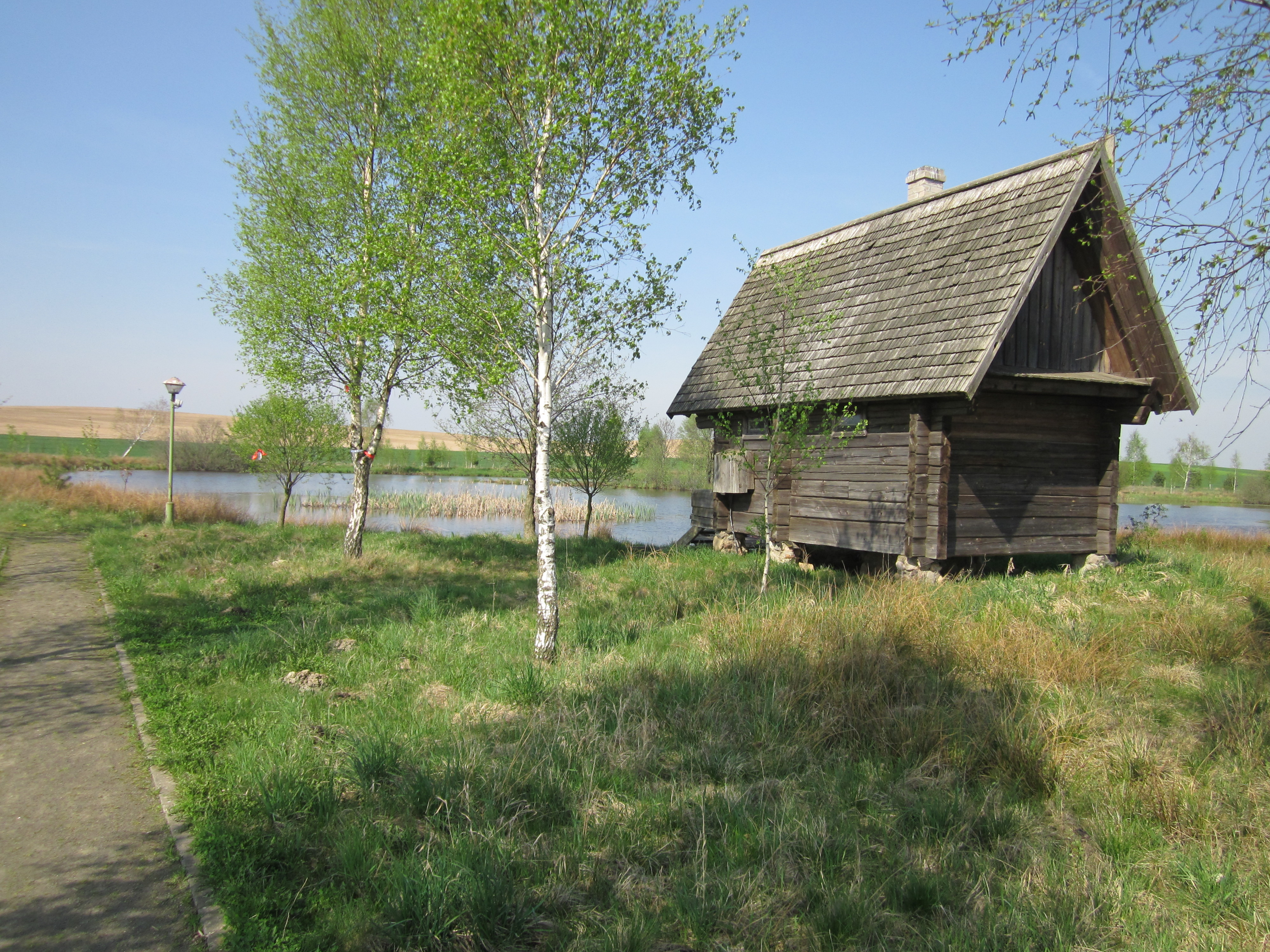 Беларуская (тарашкевіца): Сядзіба-мэмарыял А. Міцкевіча. хутар Завосьсе This is a photo of Belarusian heritage monument. Reference number: 113Г000056 ( WLM)